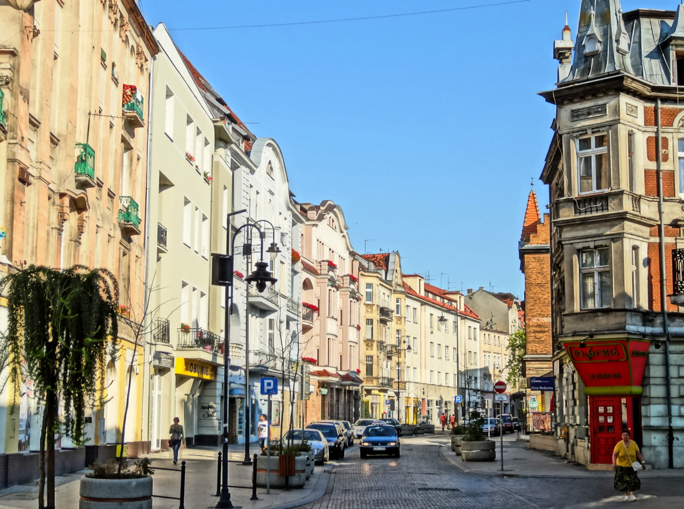 Ulica Dworcowa w Bydgoszczy na odcinku od ul. Warmińskiego do ul. Królowej Jadwigi